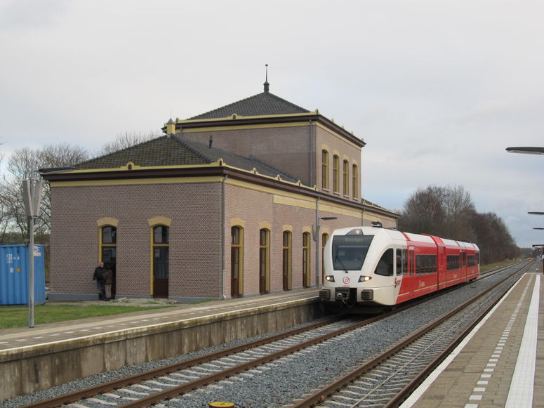 Een Spurt van Arriva bij station Zuidbroek